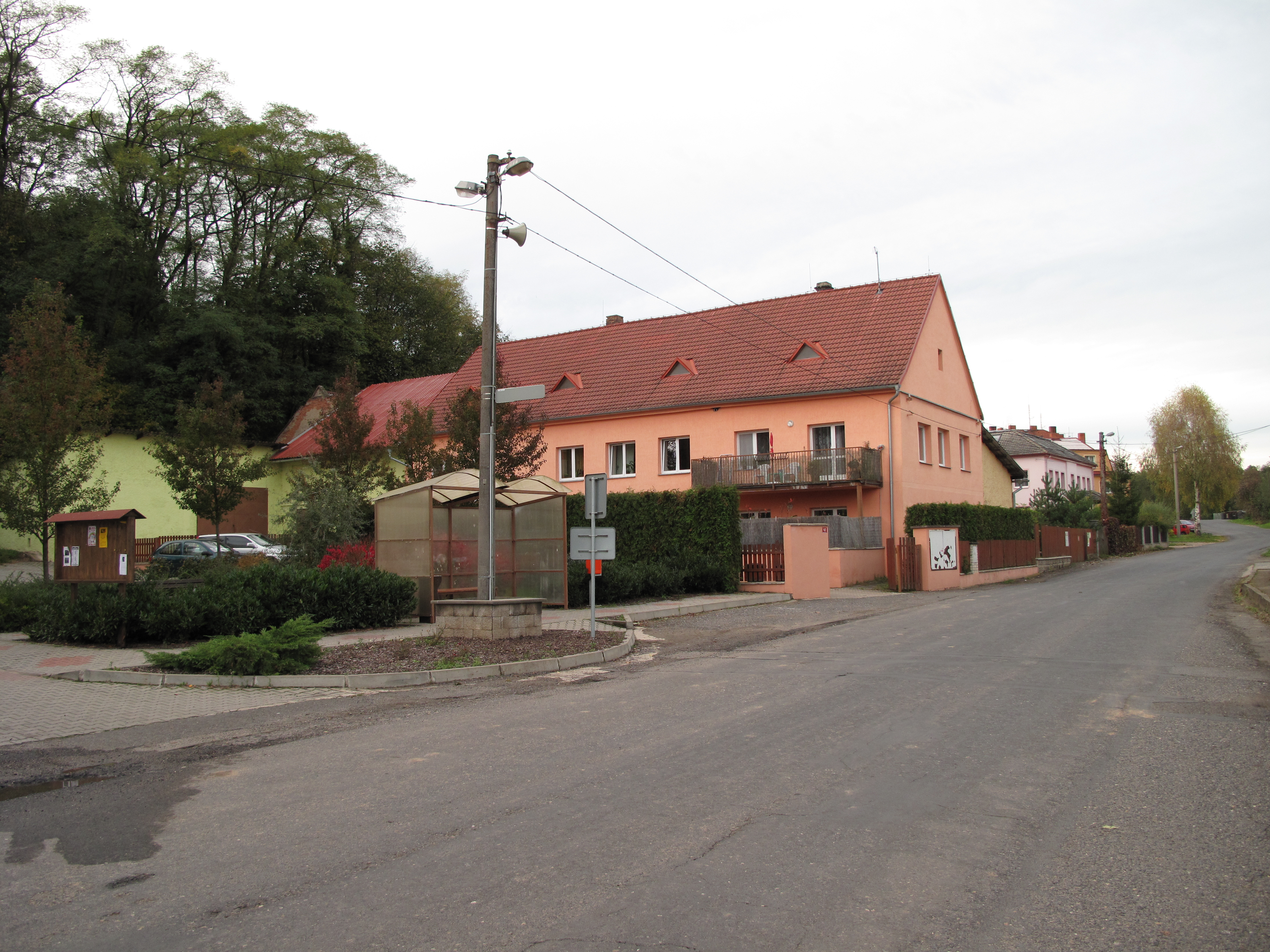 Růžový dům ve Snědovicích. Okres Litoměřice, Česká republika.